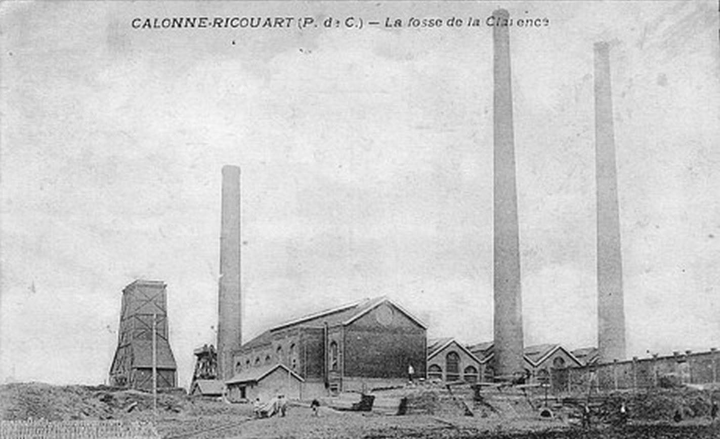 La Fosse n° 2 de la Compagnie des mines de La Clarence était un charbonnage constitué d'un seul puits situé à Calonne-Ricouart, Pas-de-Calais, Nord-Pas-de-Calais, France.